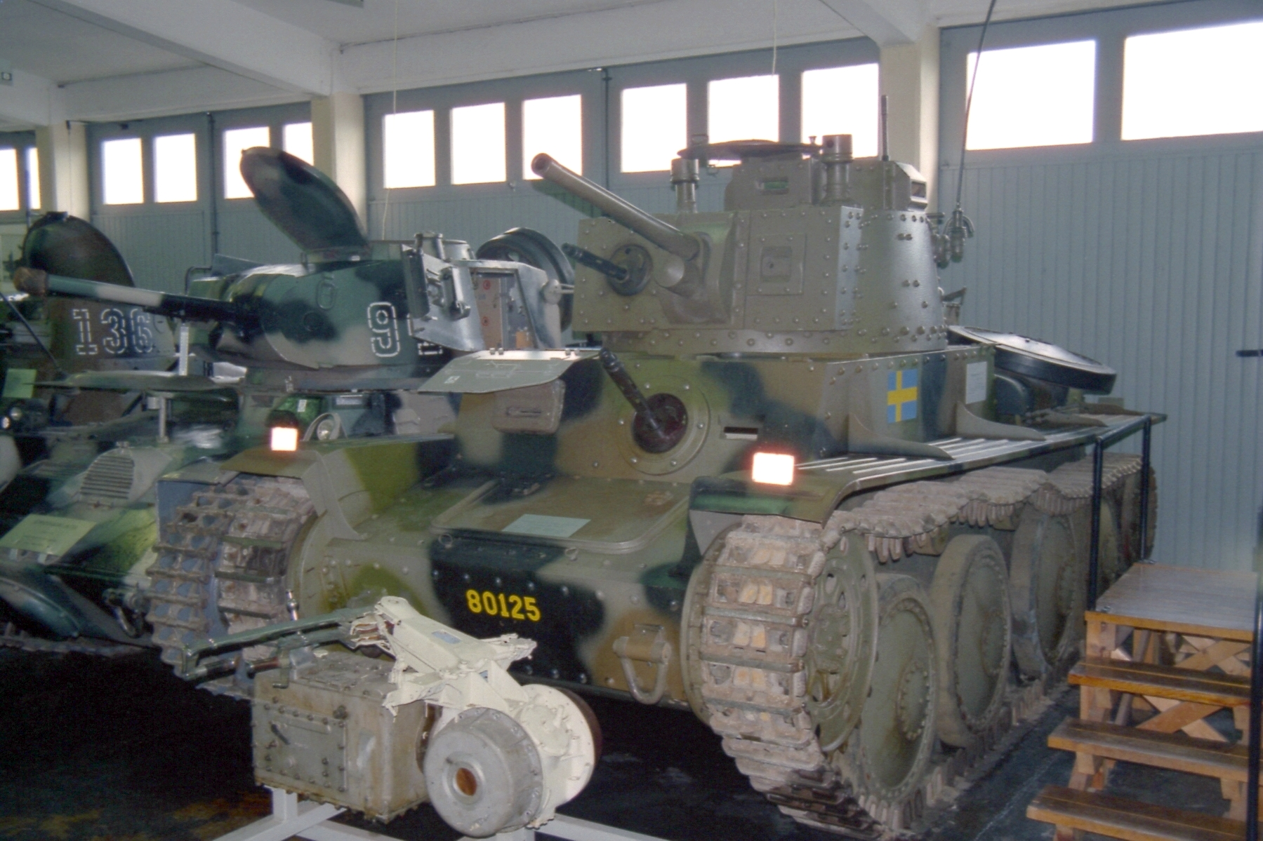 Stridsvagn m41 S I finns det i Pansarmuseet Axvall 31.05.00